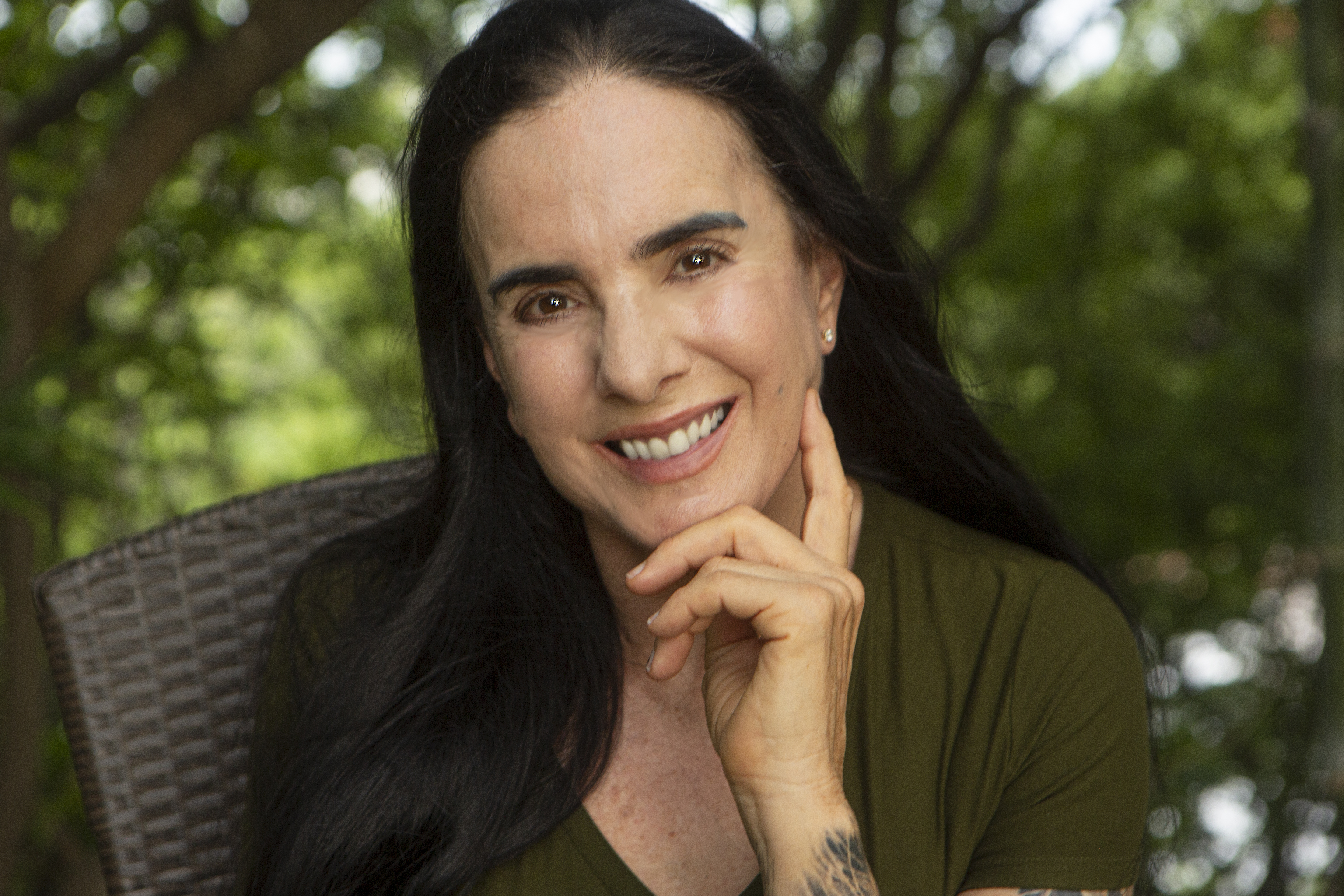 Isha Judd, gurú y maestra espiritual. Es una humanitaria australiana, considerada como “embajadora de paz” por la incesante tarea de llevar su mensaje de amor a todo el mundo. Sus conferencias y seminarios son cada vez más solicitados, atrayendo todo tipo de público y sus iniciativas de apoyo social, que gratuitamente se brindan a sectores marginados a través de su fundación, están logrando que sus enseñanzas estén disponibles para todos. No impone opiniones políticas, dogmas ni conceptos académicos, sin embargo está considerada como una visionaria para el mundo moderno, siendo invitada a hablar en foros internacionales, en empresas, en cárceles de alto riesgo, con miembros de la política, del clero y de diferentes sectores sociales.